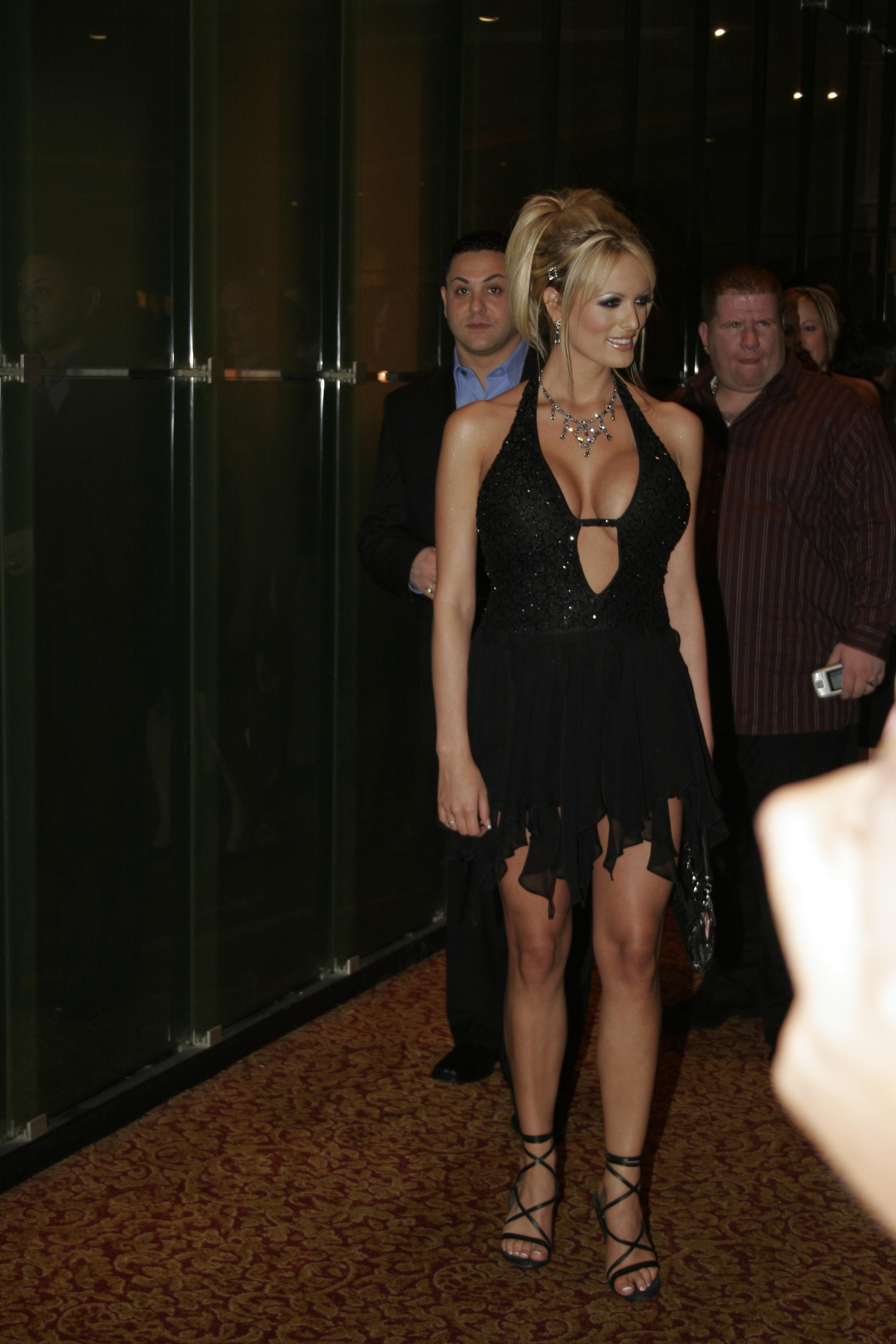 Stormy Daniels _MG_6293